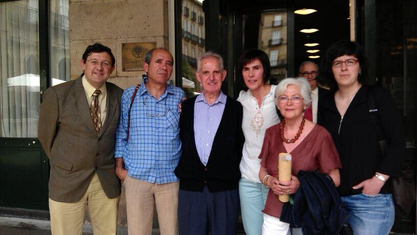 Martin Orbe eta Maite Idirin ohorezko euskaltzain diploma jaso zuten egunean